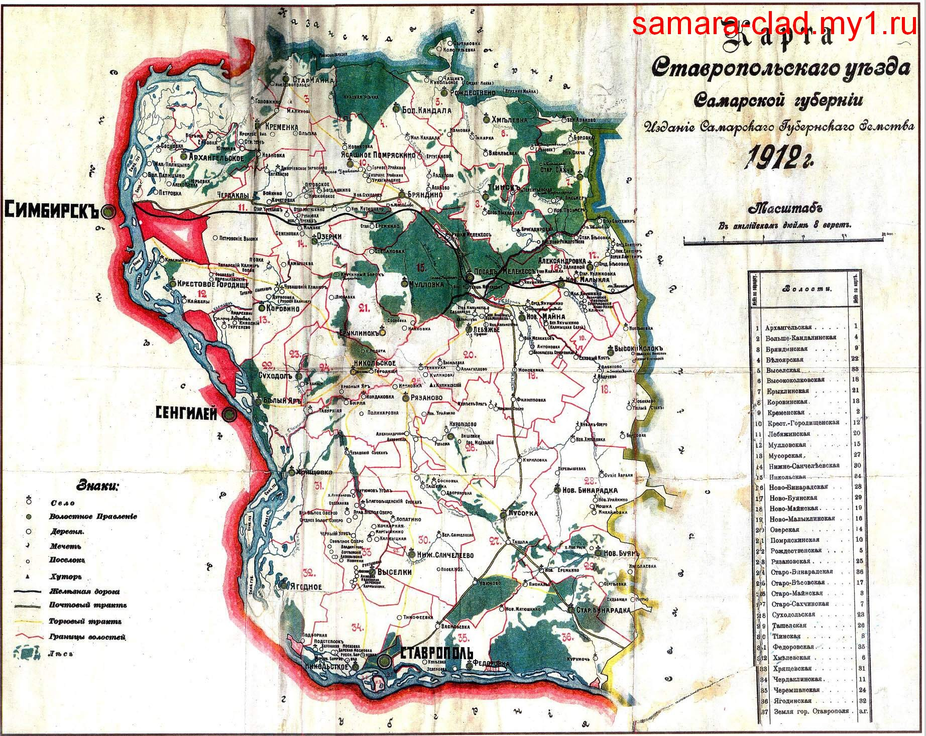 Ставропольский уезд Самарской губернии. Карта 1912 года. Издание Самарского губернского ведомства